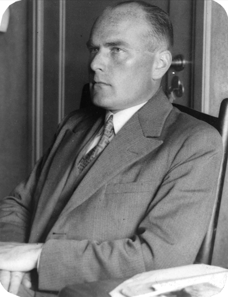 portrett, mann, teolog, professor ved Menighetsfakultetet, sittende halvfigur.